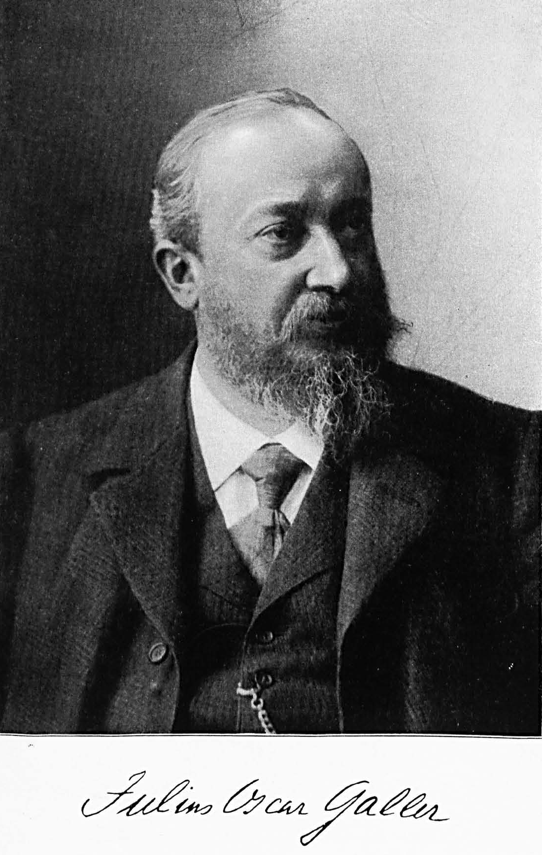 Julius Oskar Galler, Porträt.